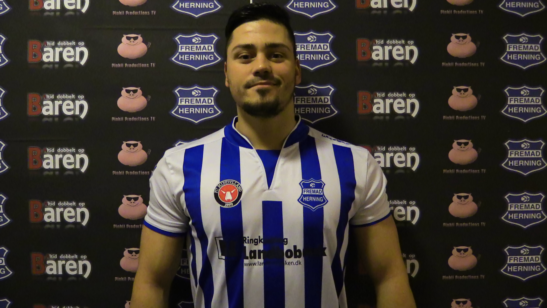 Profil billede 2015 af den målfarlige angriber Ermin "Hulk" Rebac